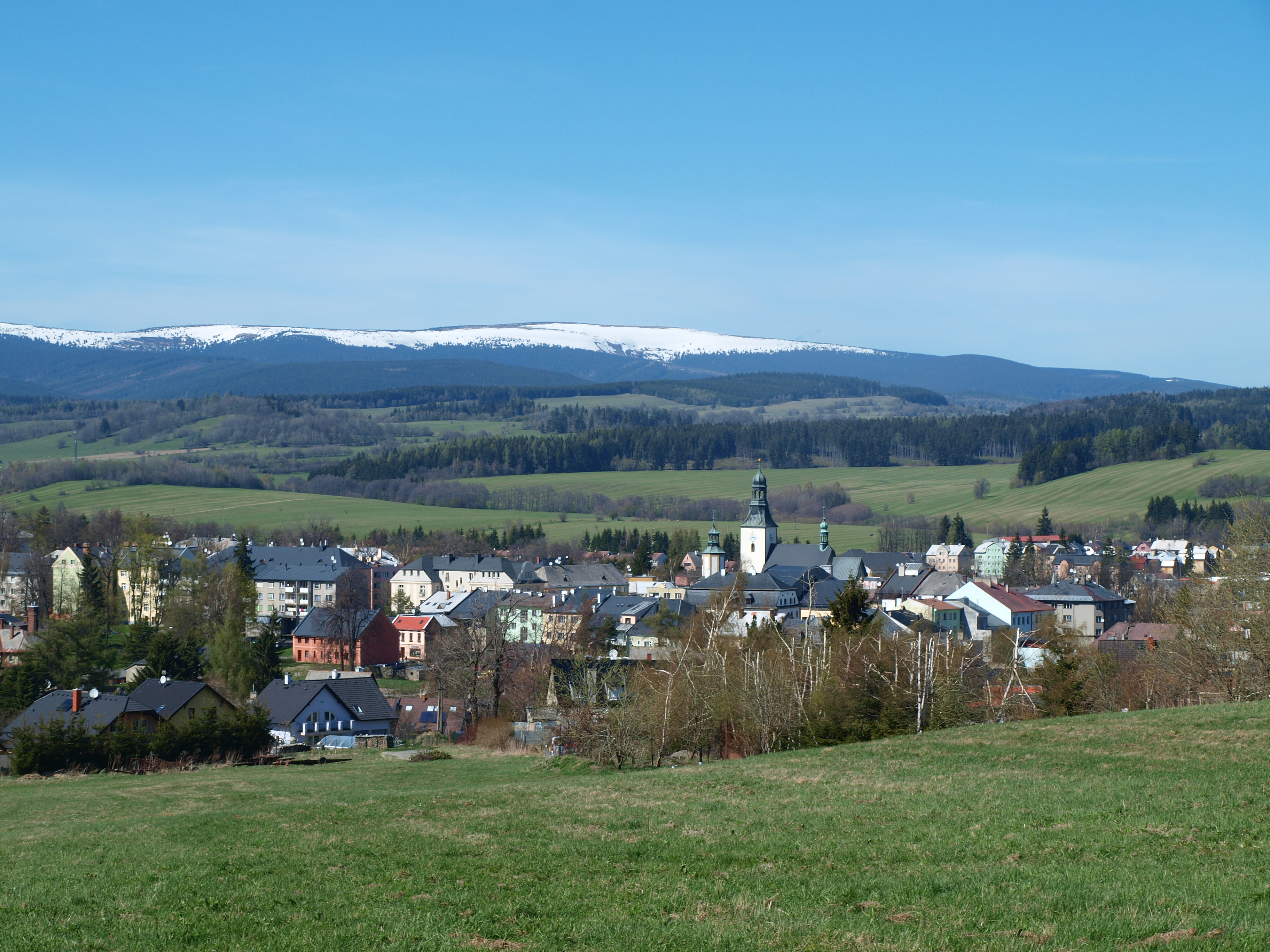 Rýmařov od jihu